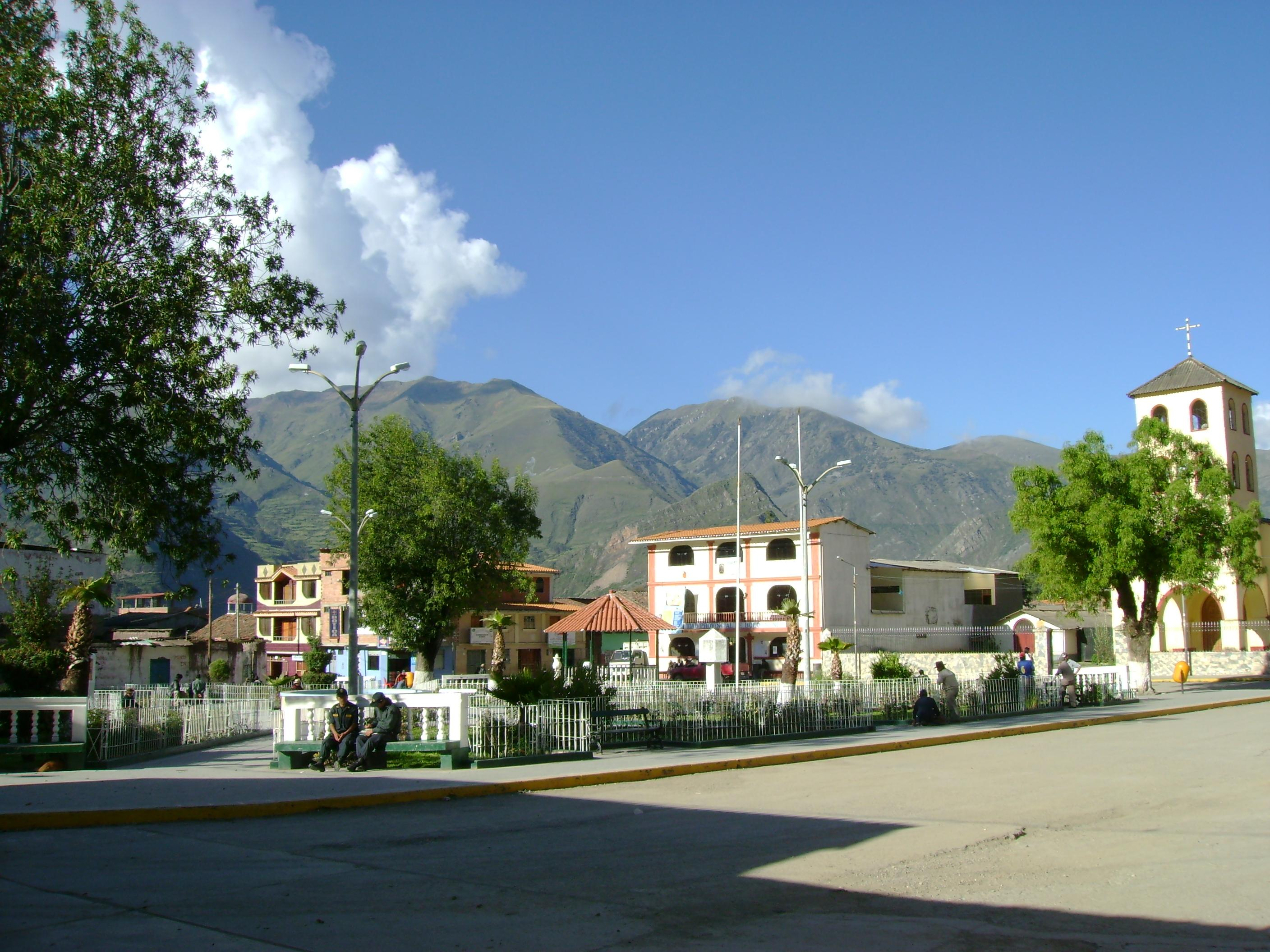 Atardecer en la plaza.